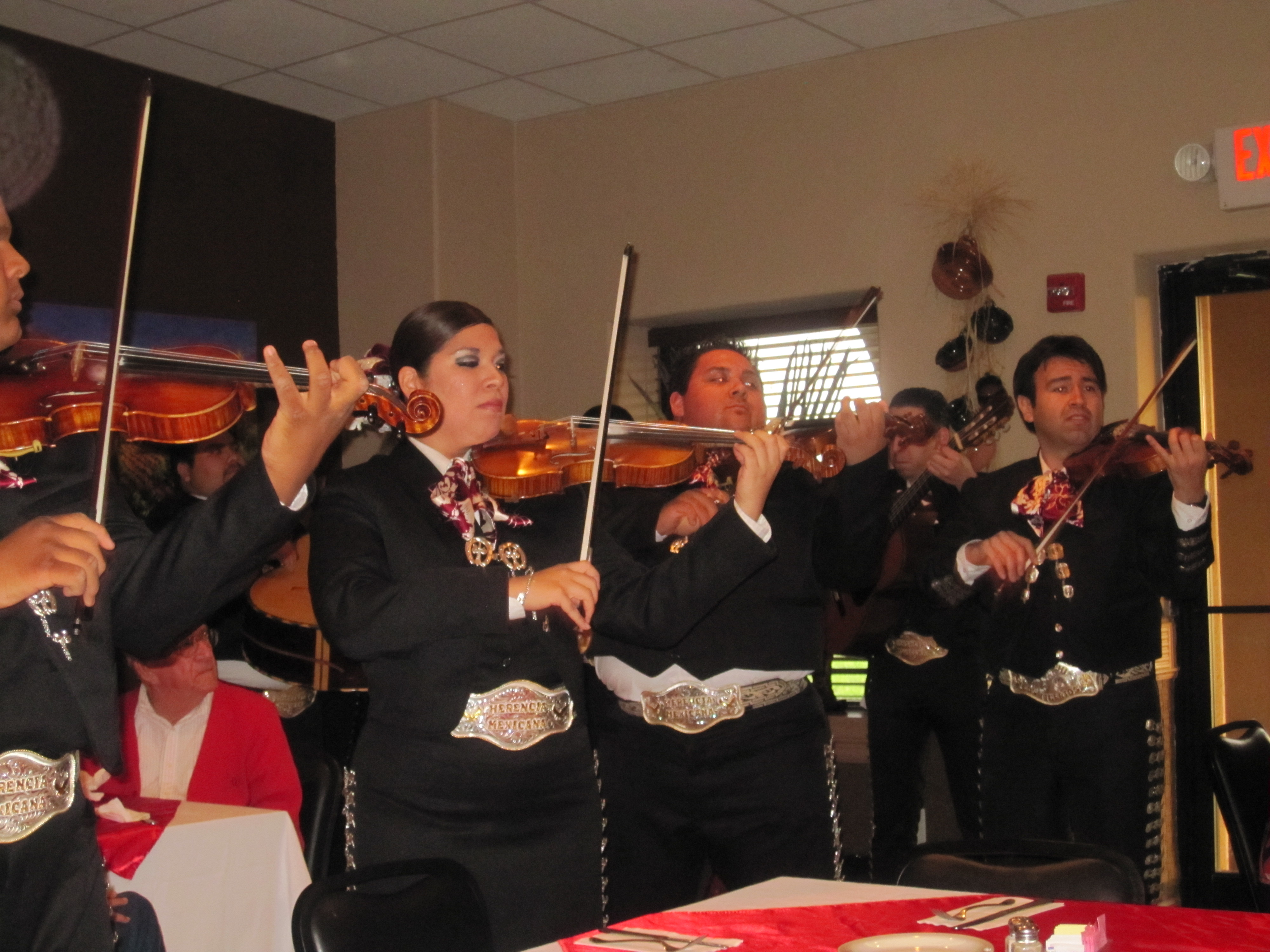 Violinists in restaurant